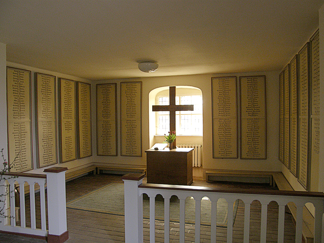 Die Kirche in Burg (Spreewald)